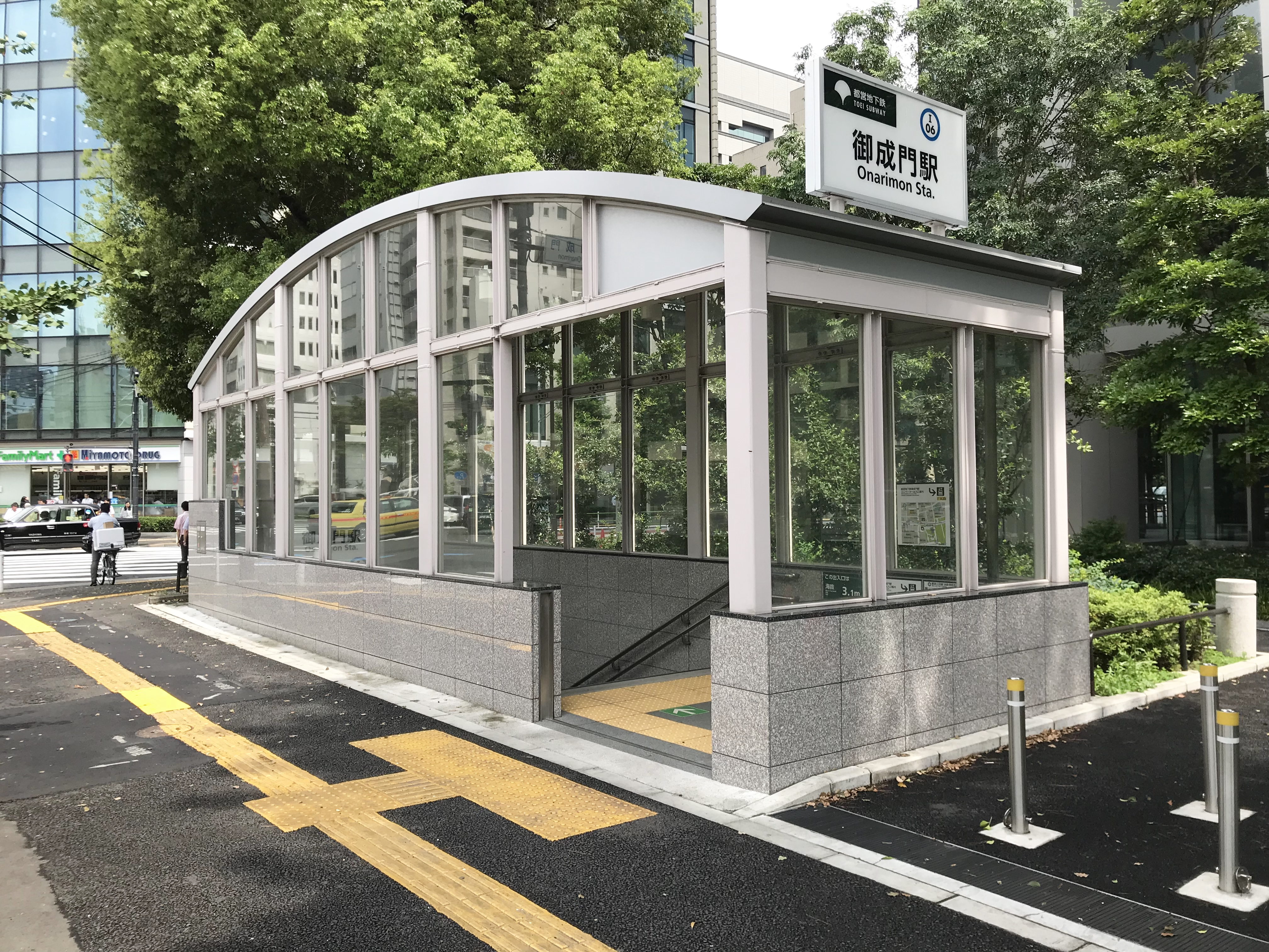 都営地下鉄三田線御成門駅A3a番出入口